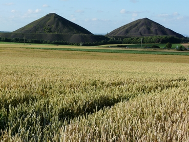 Photo : Lionel